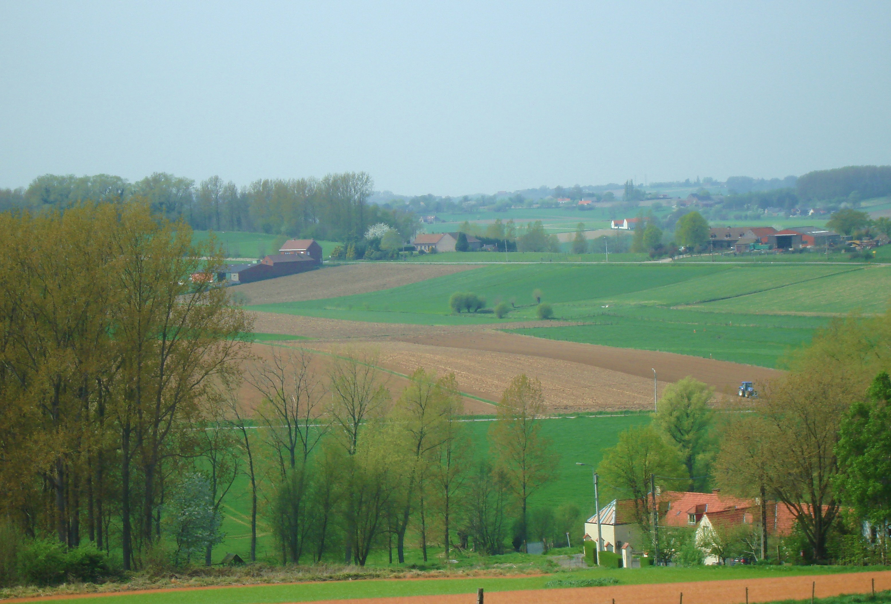 Bosgatstraat, Vlaamse Ardennen, Maarkedal, Vlaanderen, België